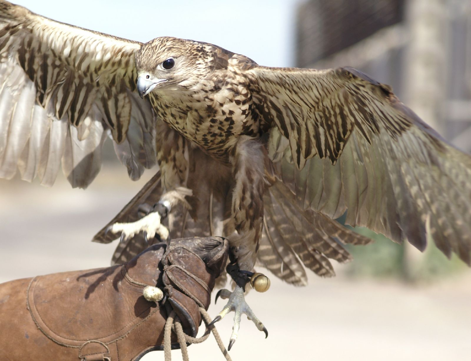 Saker falcon - Falco cherrug.